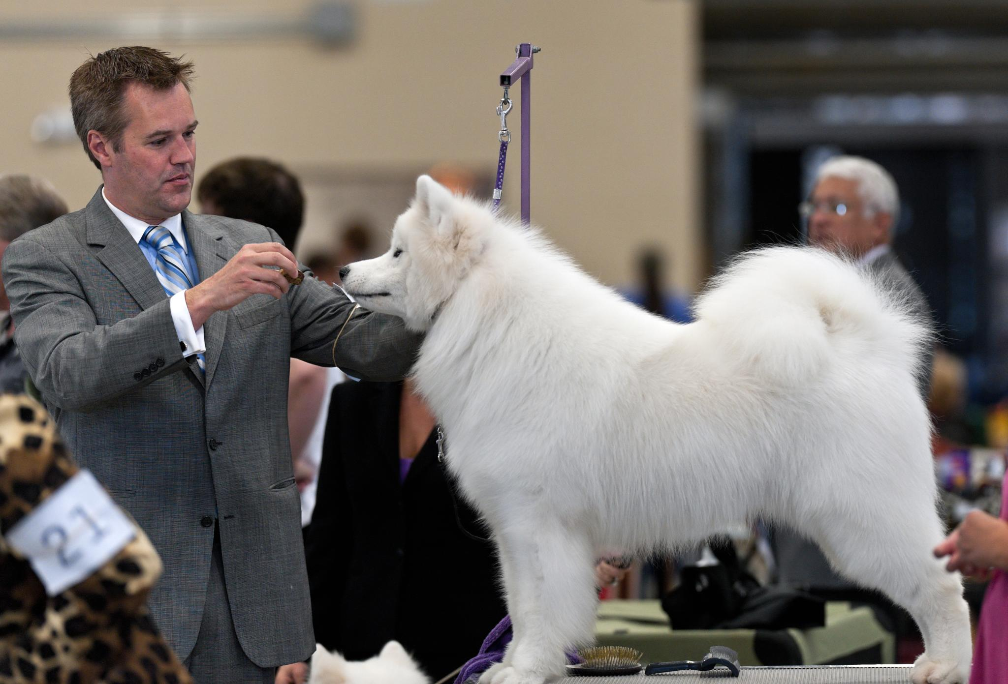 Who does this look like to you?